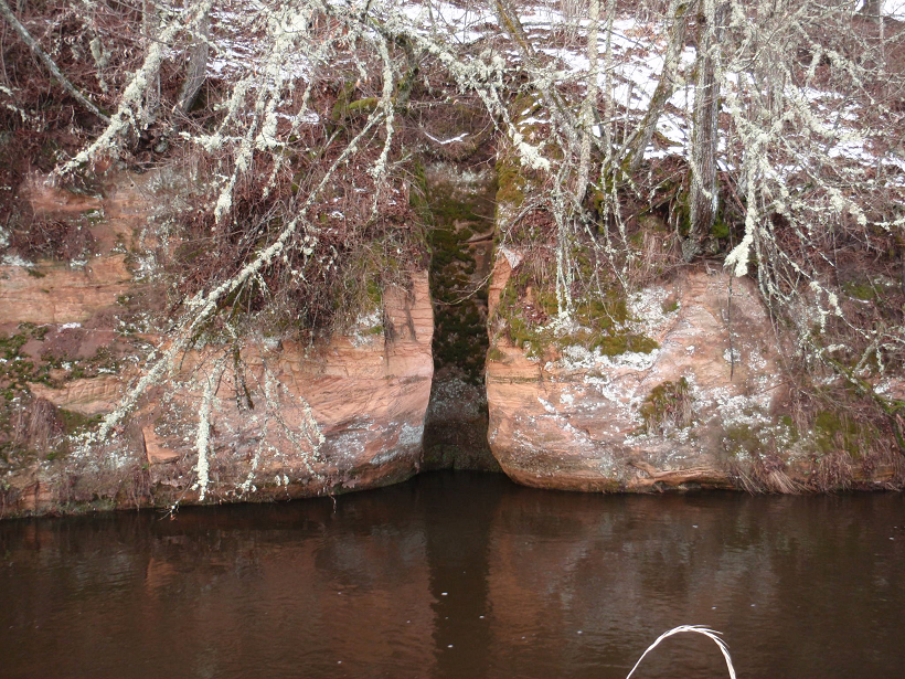 Valli pae